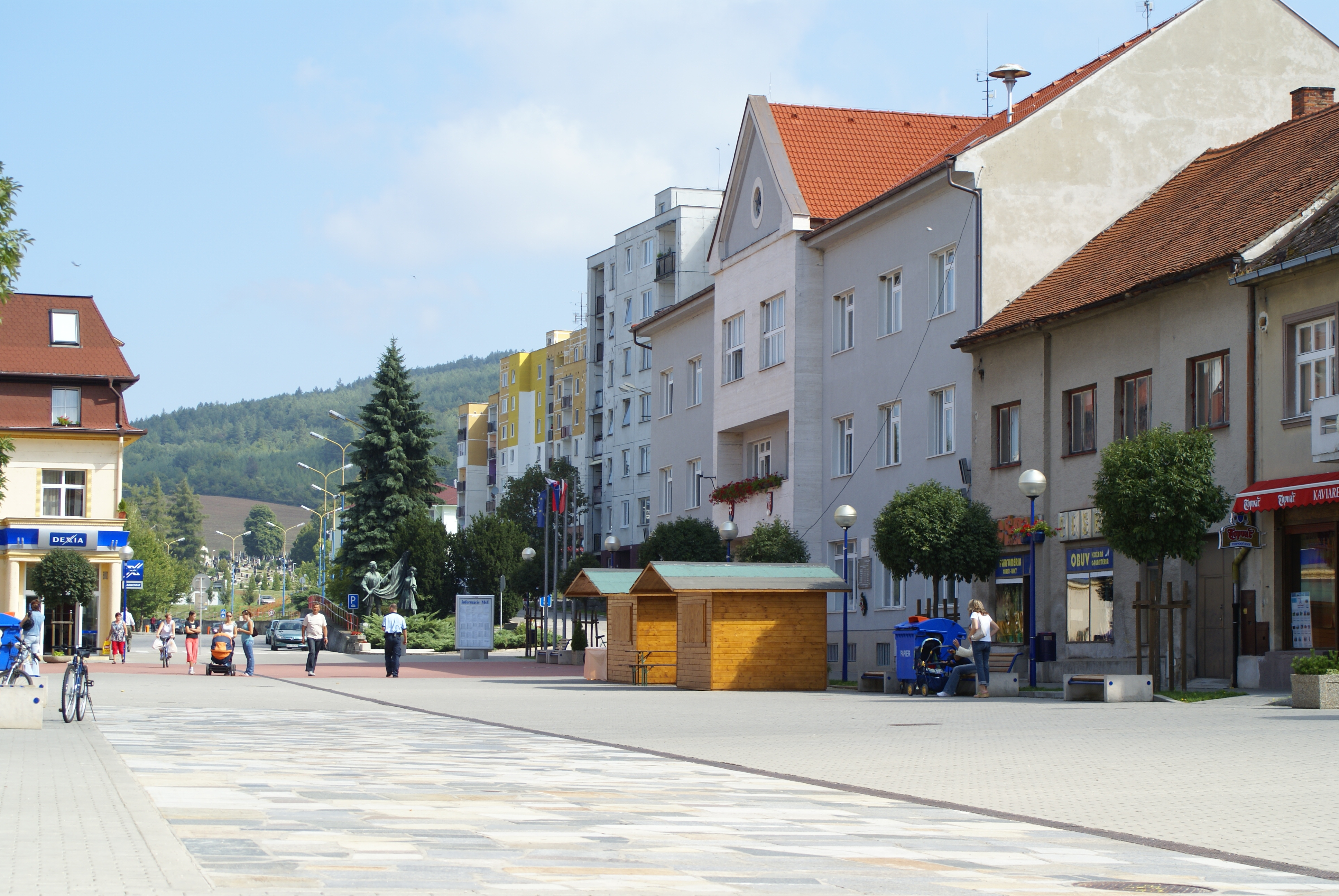 Brezová pod Bradlom, Slovak Republic